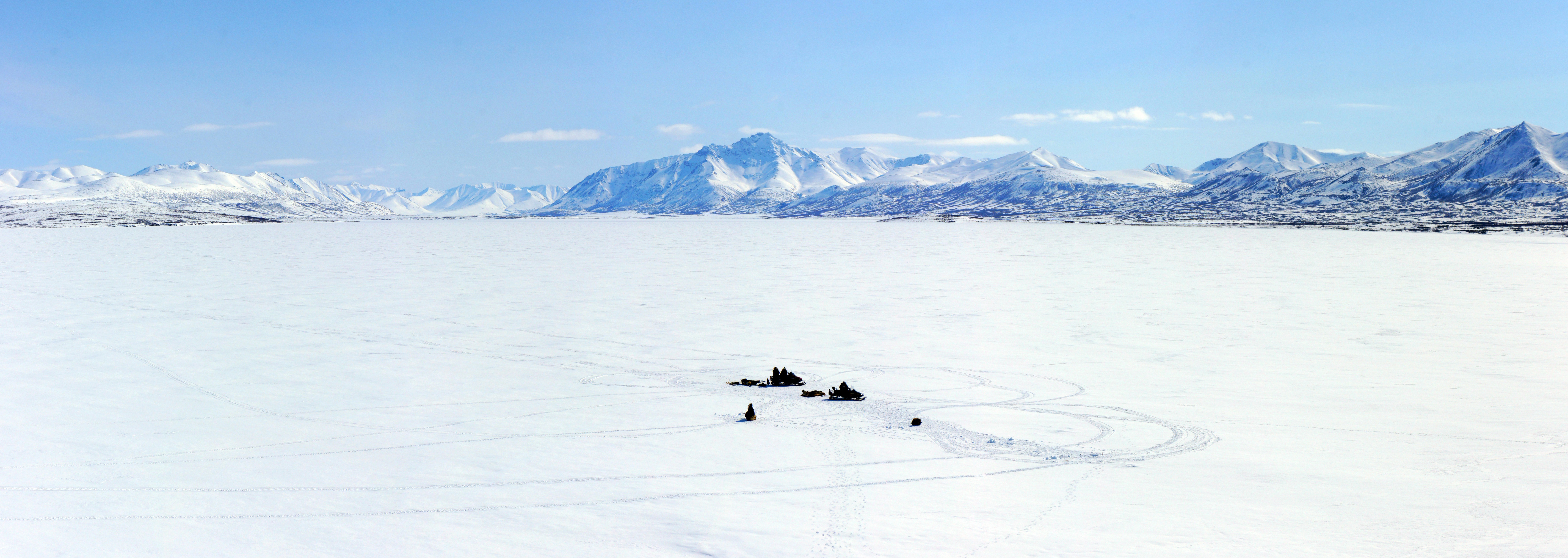 Озеро Майниц